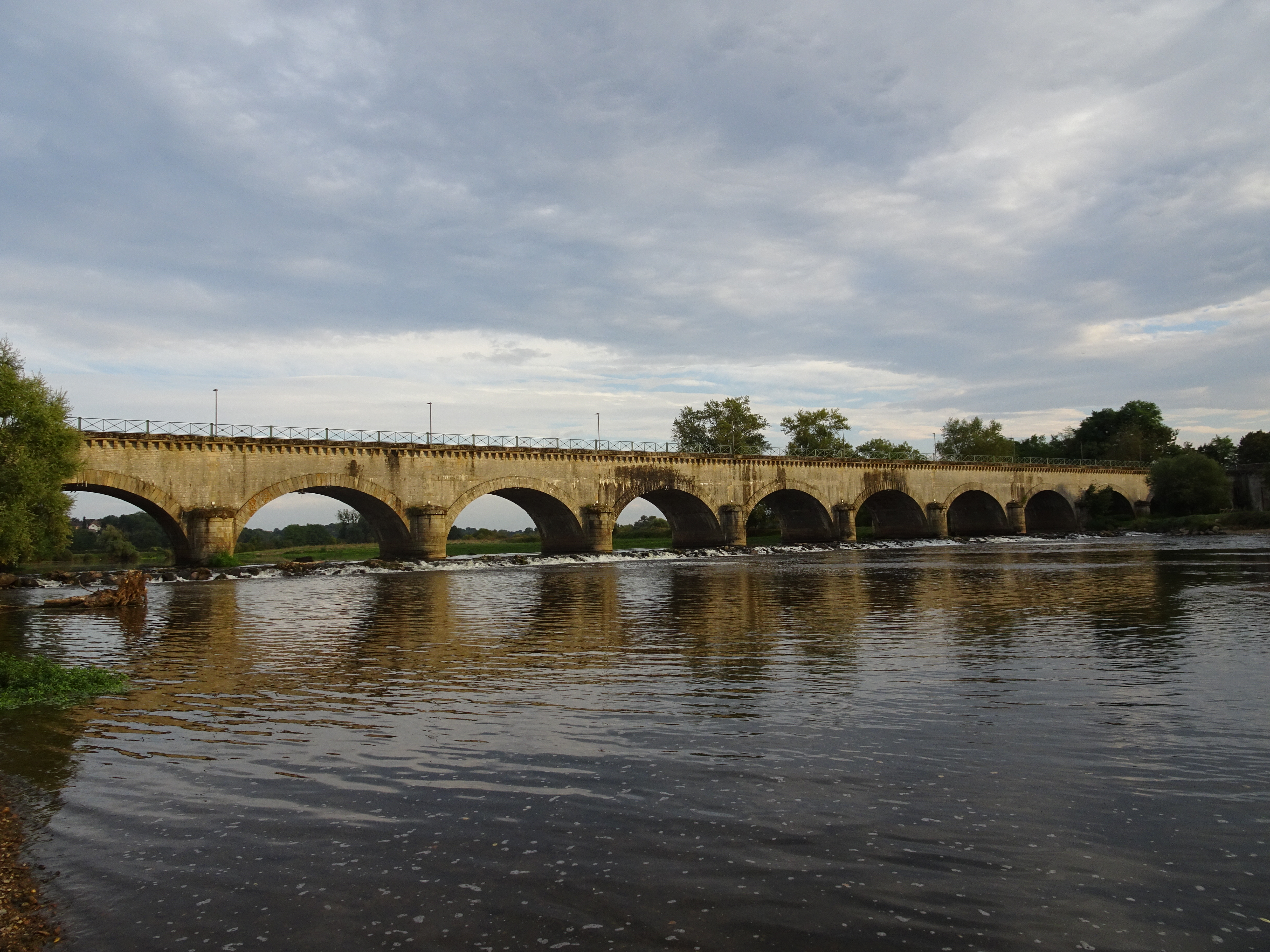 Face ouest du pont-canal de Digoin (71).